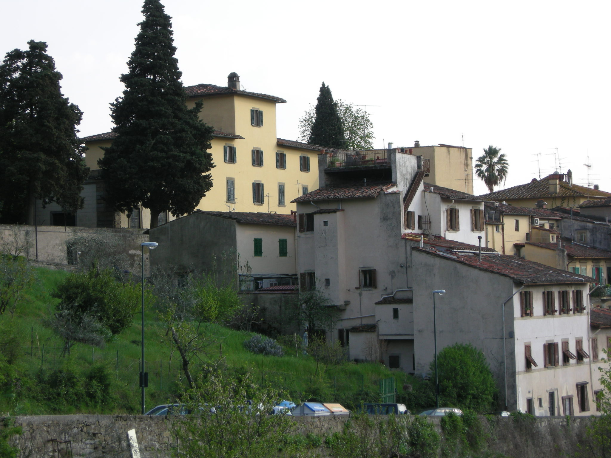 Villa martini bernardi firenze